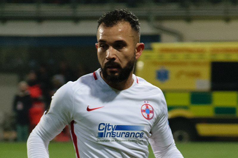 Júnior Morais